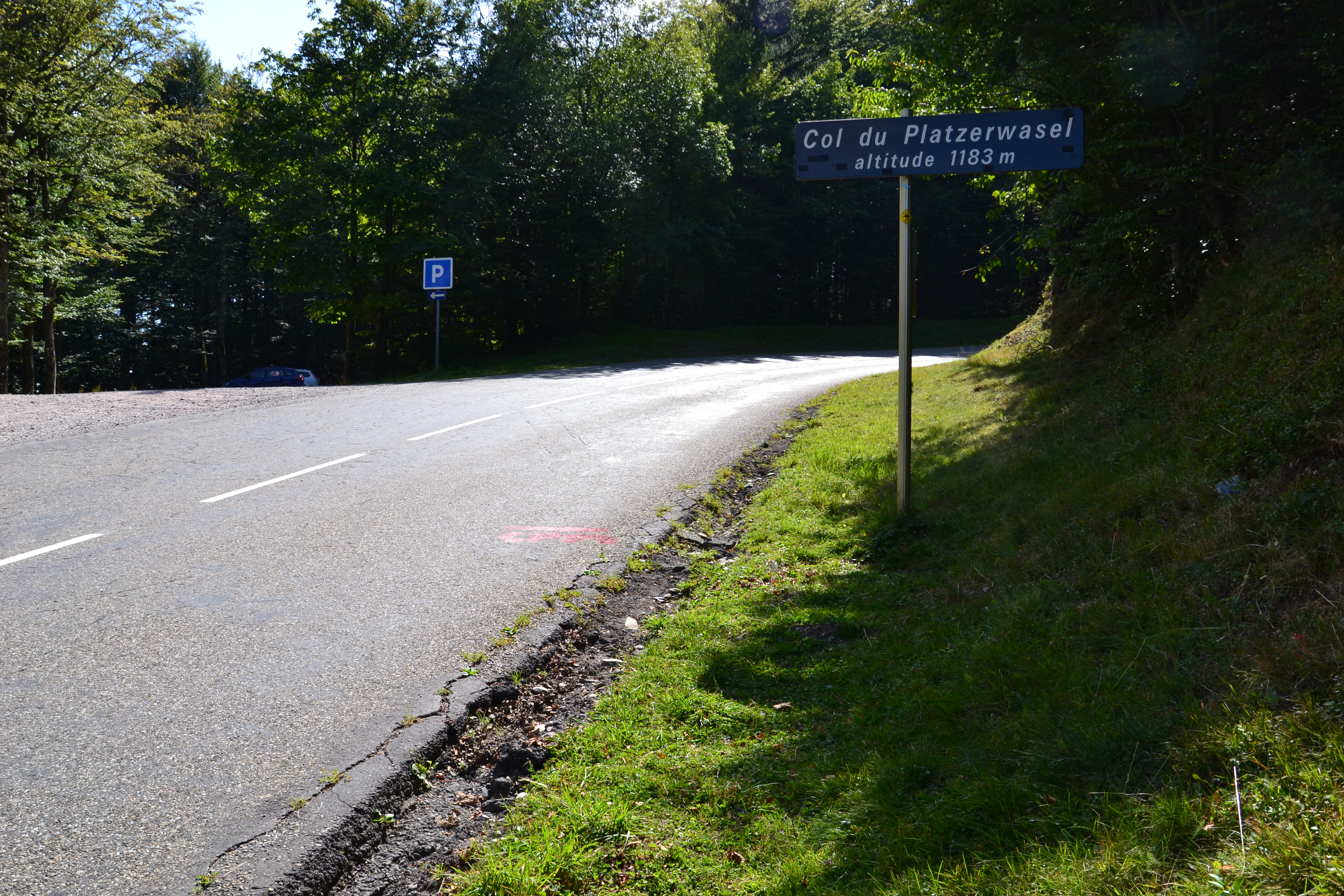 Sommet du col du Platzerwasel.